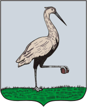 В серебряном поле журавль, стоящий на одной ноге, в другой, поднятой, держит камень.